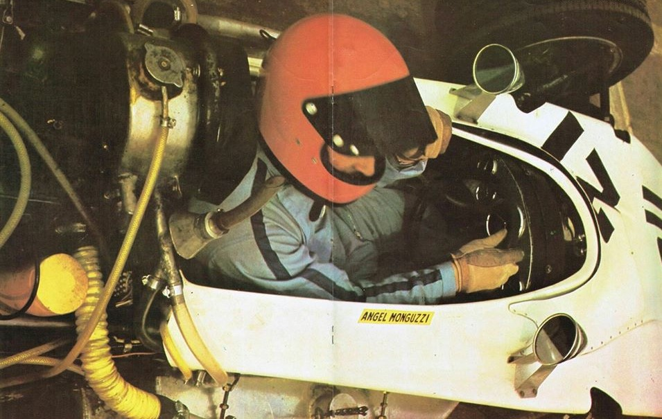 Ángel Monguzzi en su Trueno Sprint-Chevrolet. Posiblemente en 1970